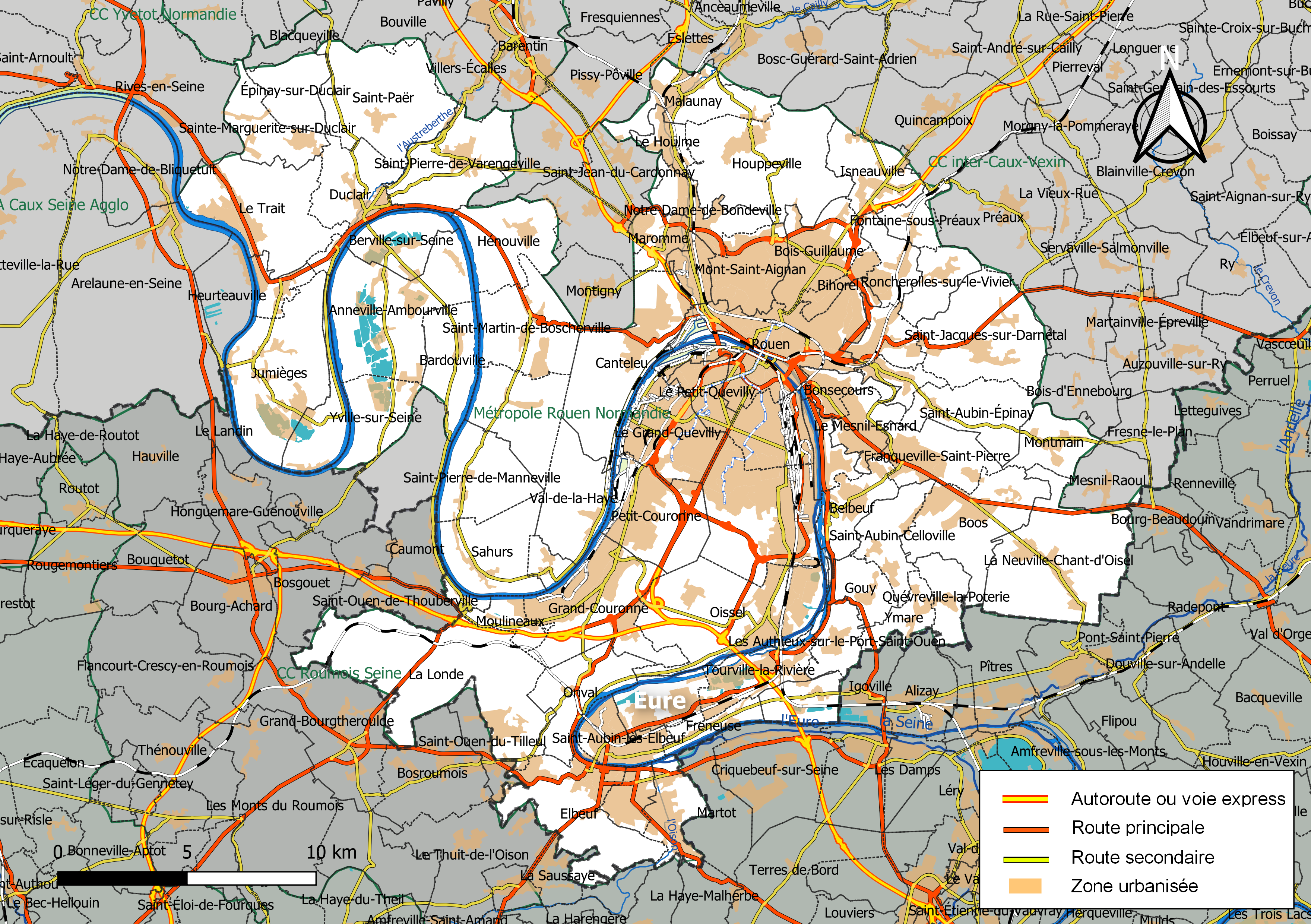 Carte géographique de l'intercommunalité Métropole Rouen Normandie, département de la Seine-Maritime, France. Composition au 1er janvier 2019.